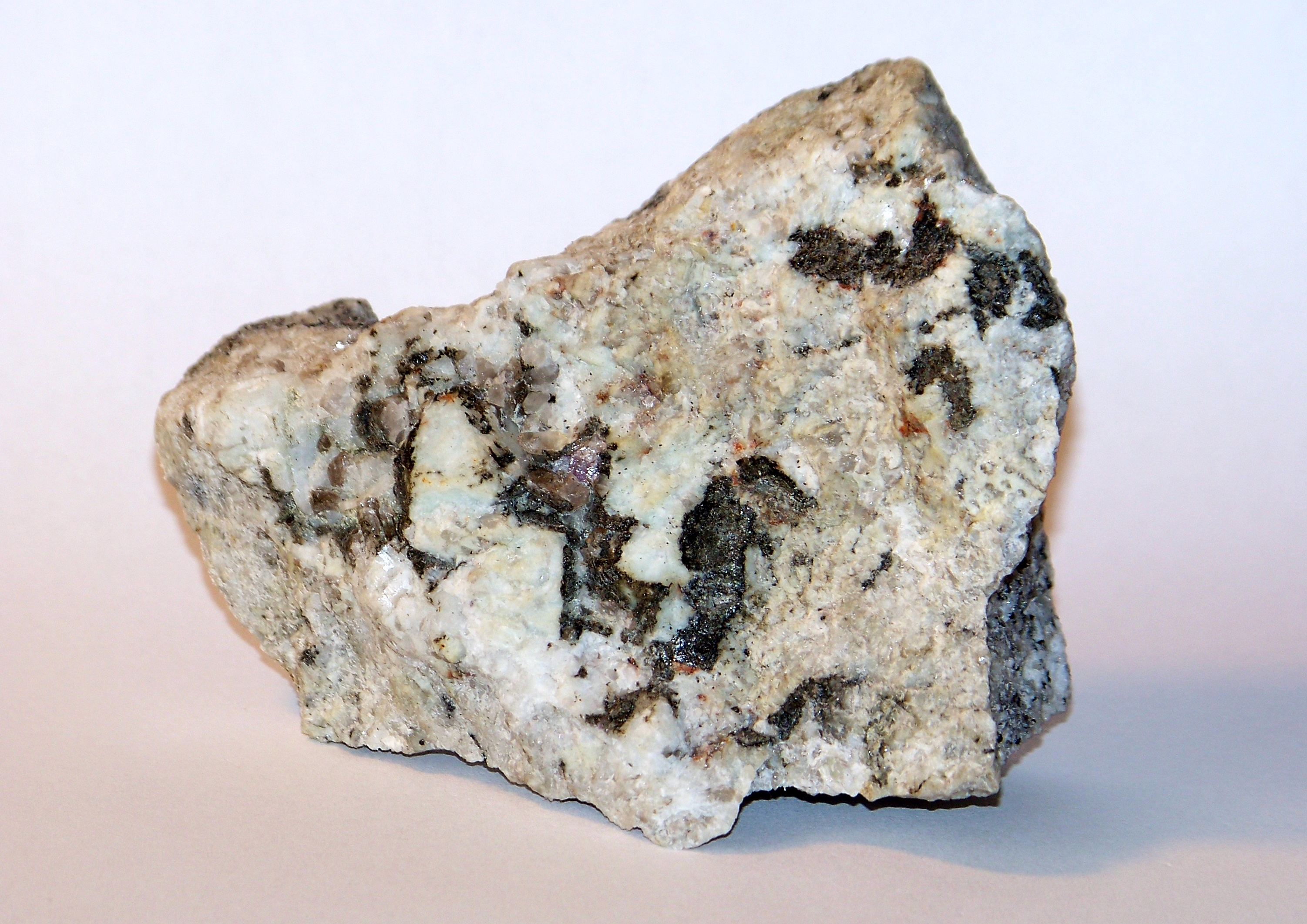 Pegmatyt z mikroklinem i fluorytem. Paszowice, Dolny Śląsk, Polska.